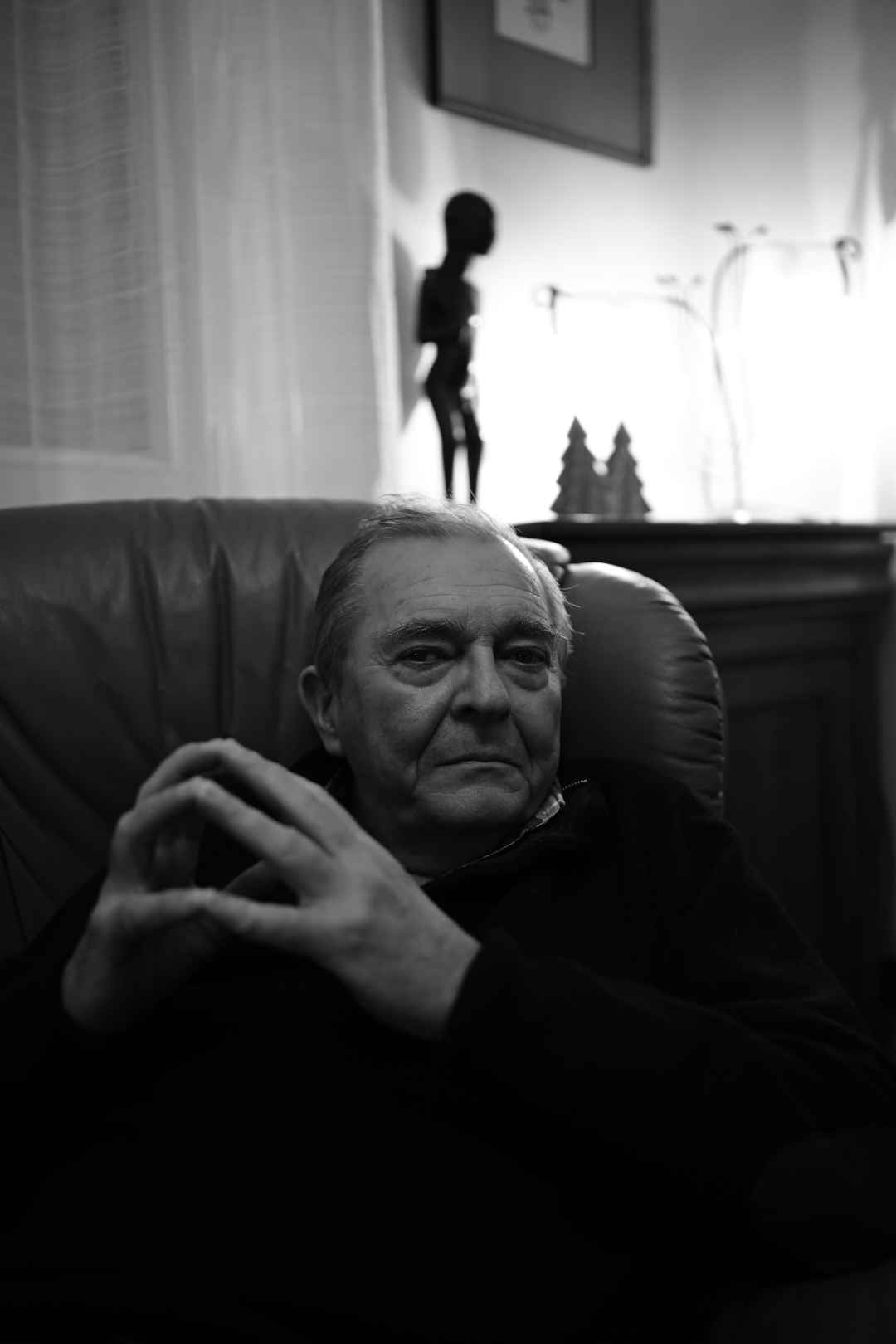 Hervé Carn dans son salon